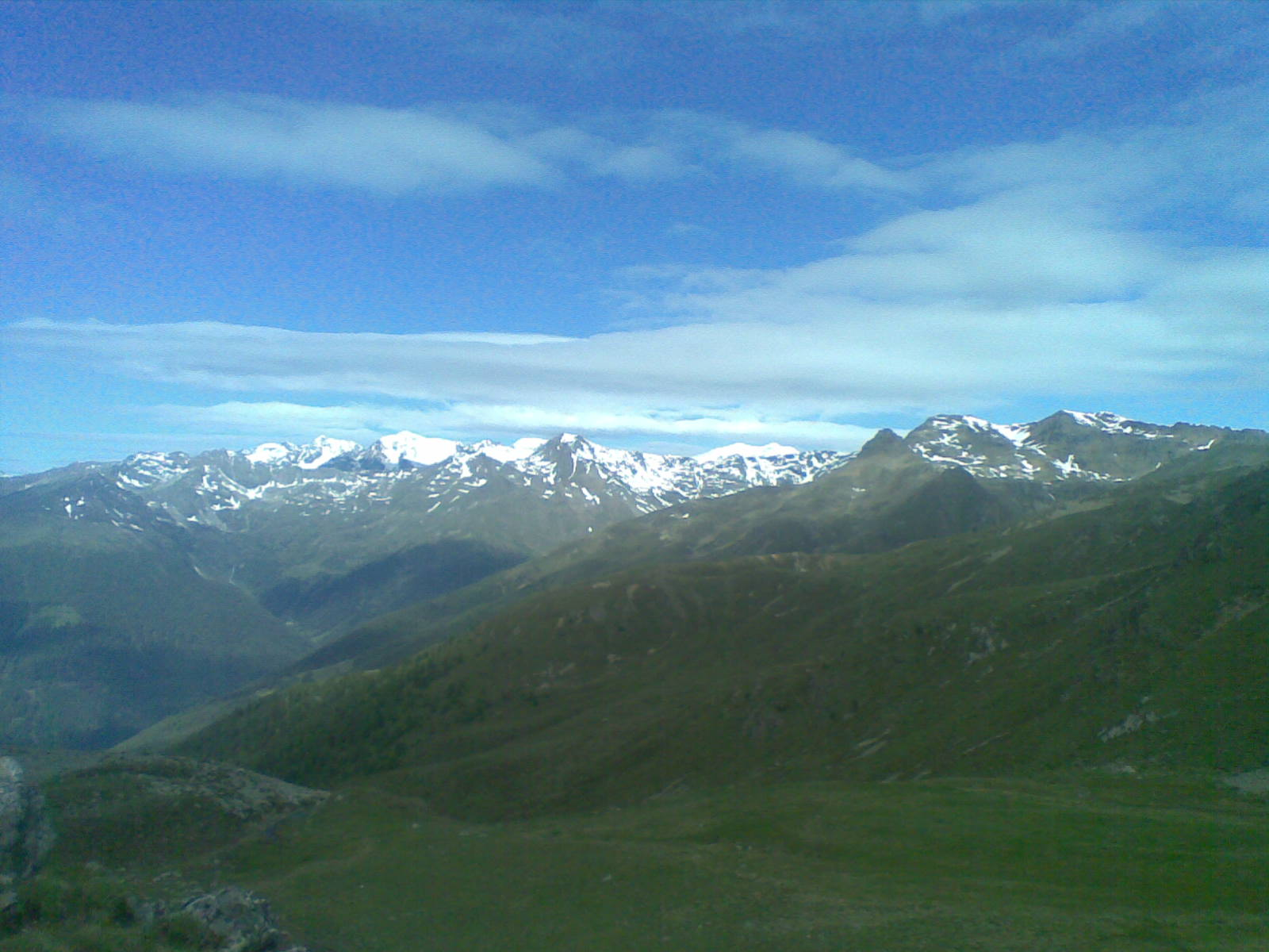 Vista fantastica dal passo Palù